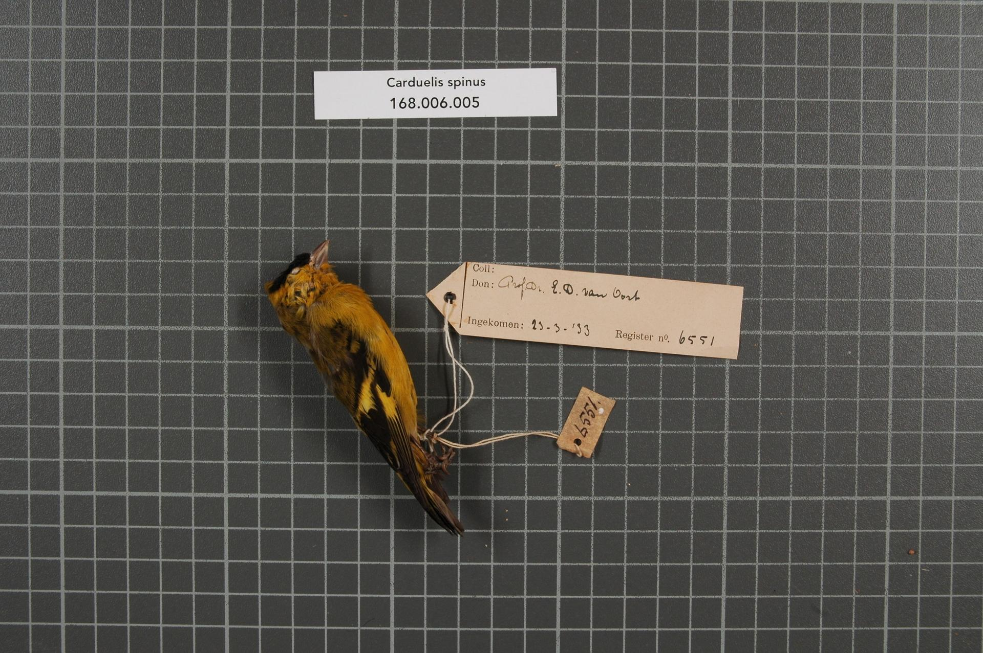 Carduelis yarrellii (Audubon, 1839)